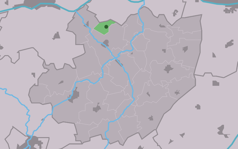 Kaartsje fan himrik fan Baaium